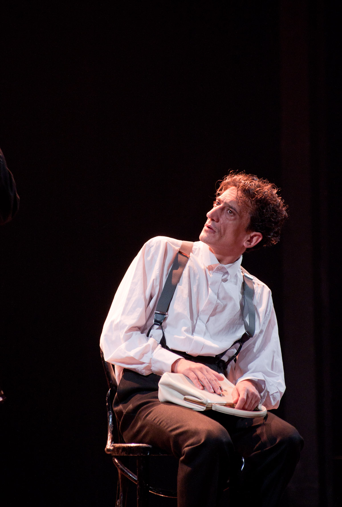 Pálffy Tibor A Mizantróp című előadásban (Alceste, Célimene szerelmeseként). Sepsiszentgyörgy.